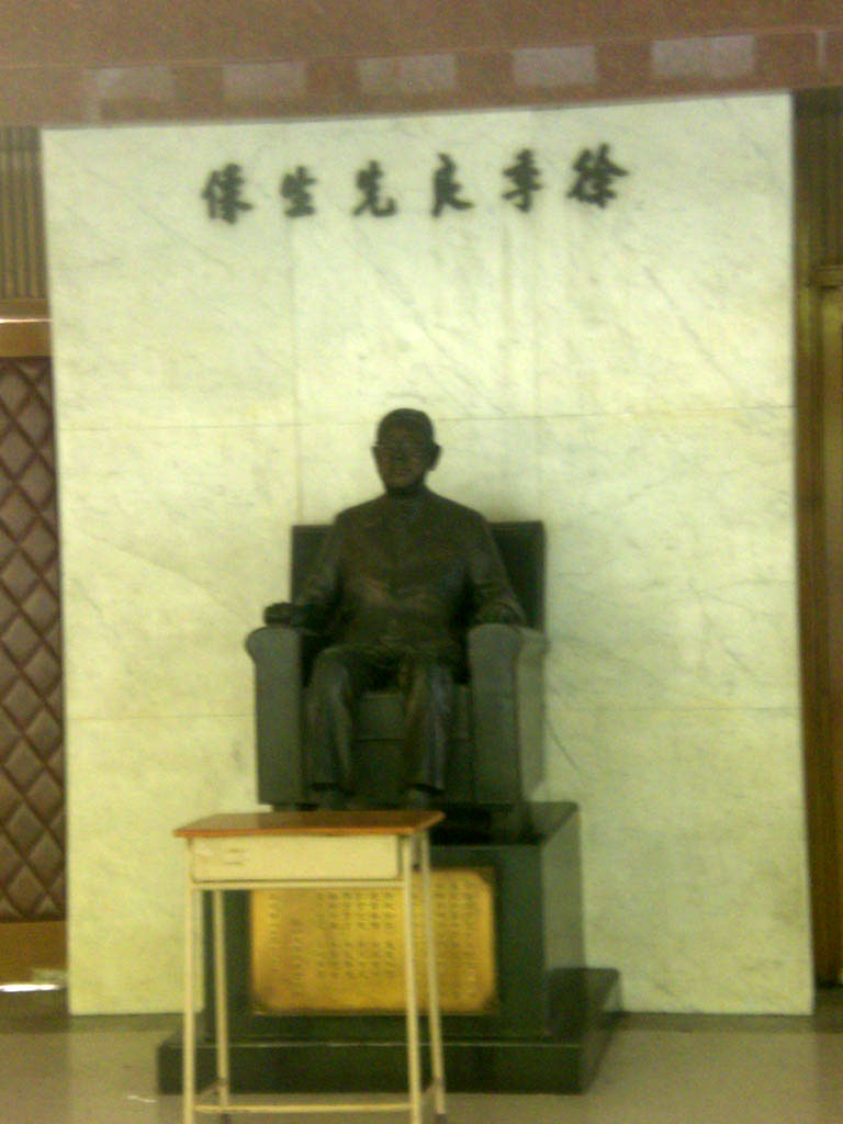 寶馬山蘇浙公學正門大堂徐季良銅像